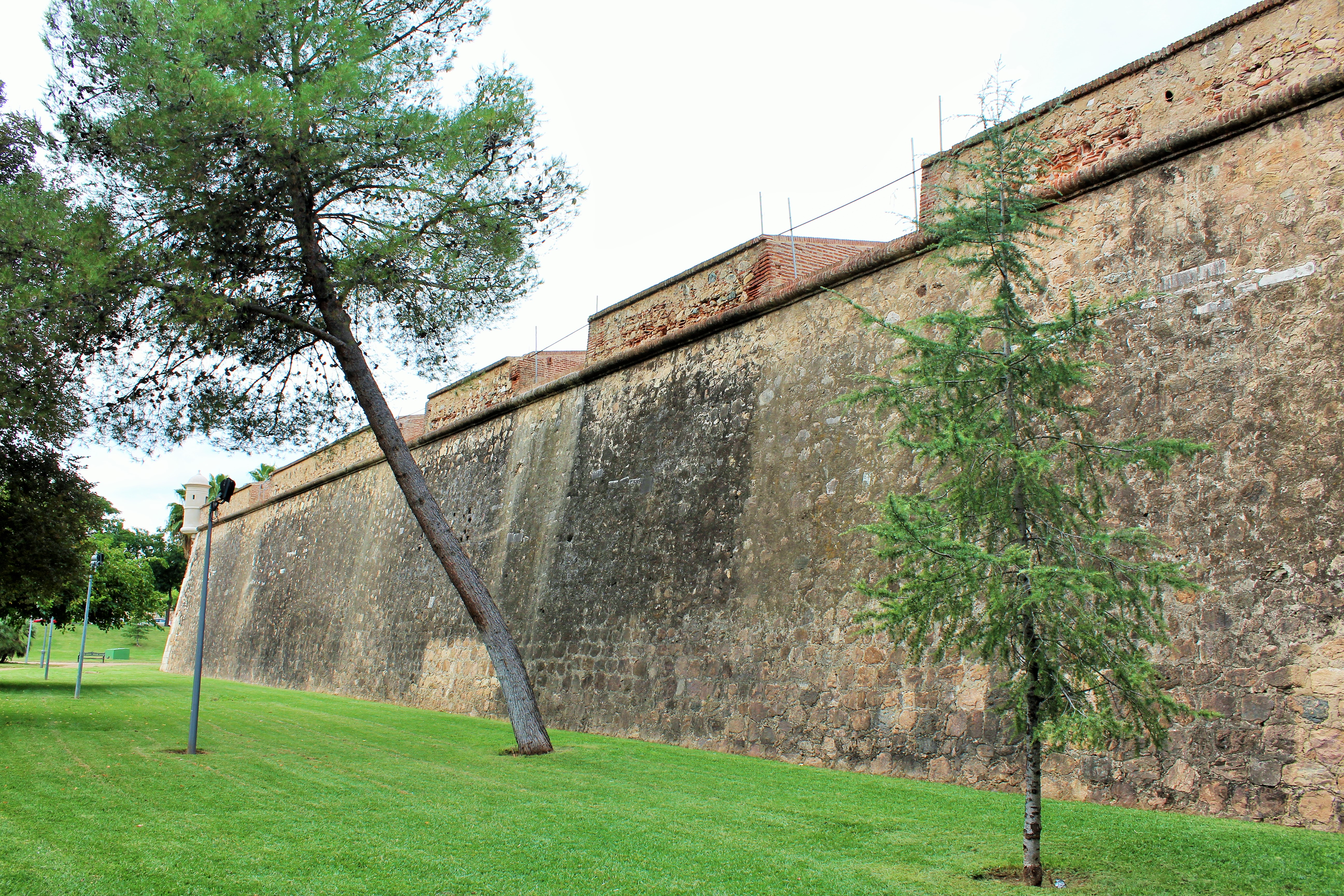 Gran lienzo con troneras y garita de vigilancia al fondo.